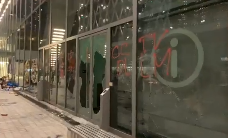 有人於知專學院校園內破壞，噴漆和打破多塊玻璃